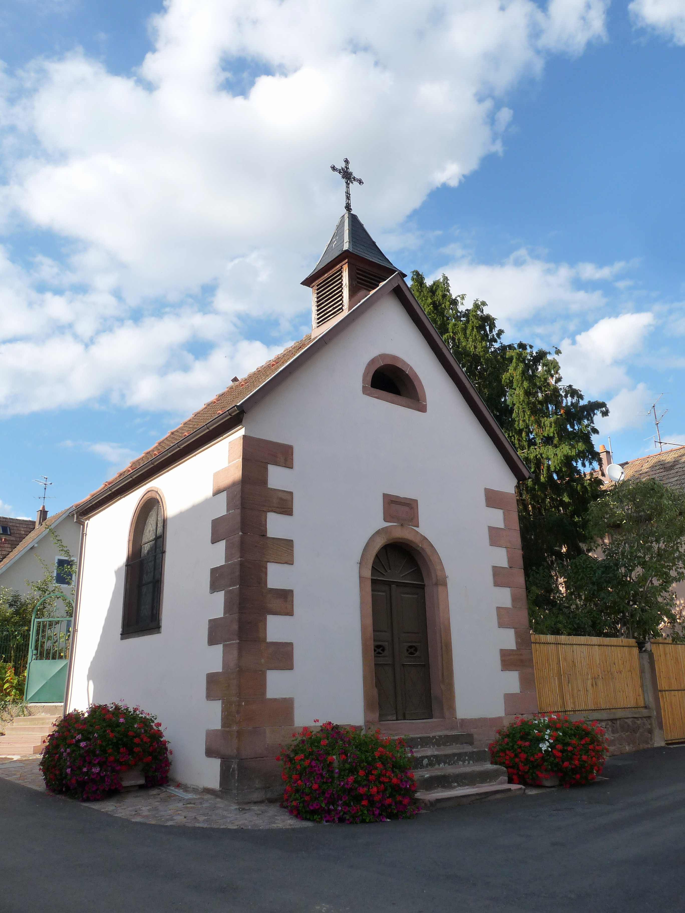 Kintzheim (Bas-Rhin) : Chapelle Notre-Dame-du-Bon-Secours (1858)